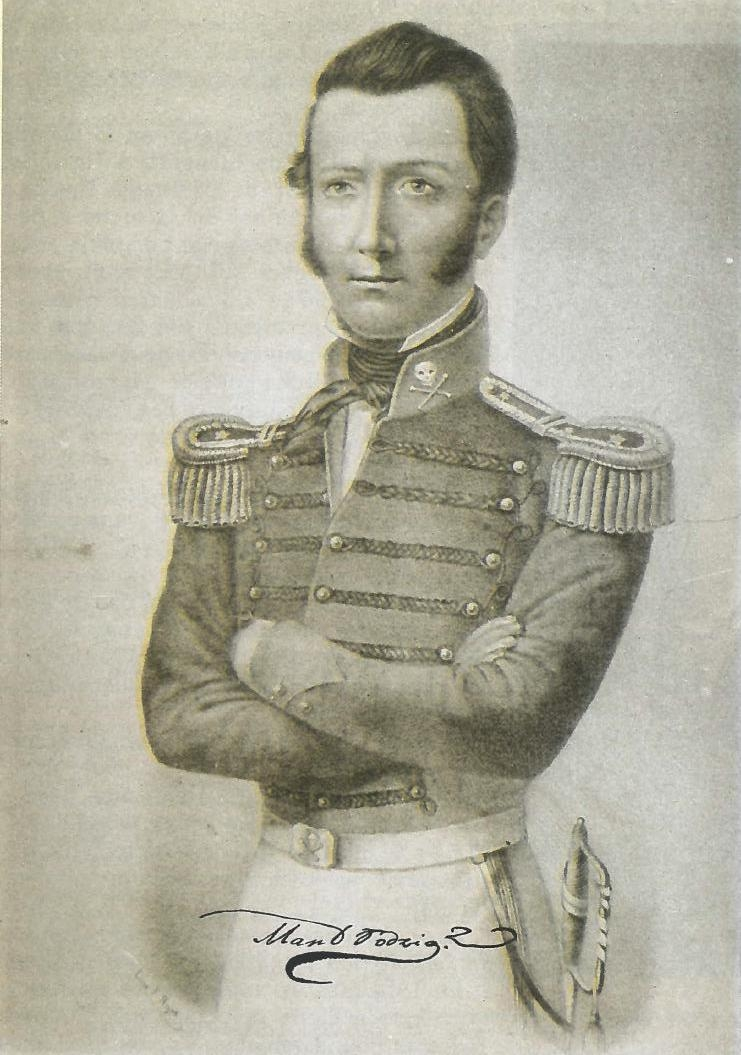 Dibujo de Manuel Javier Rodríguez Erdoíza (* Santiago, 24 de febrero de 1786; † Tiltil, 26 de mayo 1818); abogado, polìtico y guerrillero chileno, considerado uno de los principales gestores y partìcipes del proceso de independencia de su país.